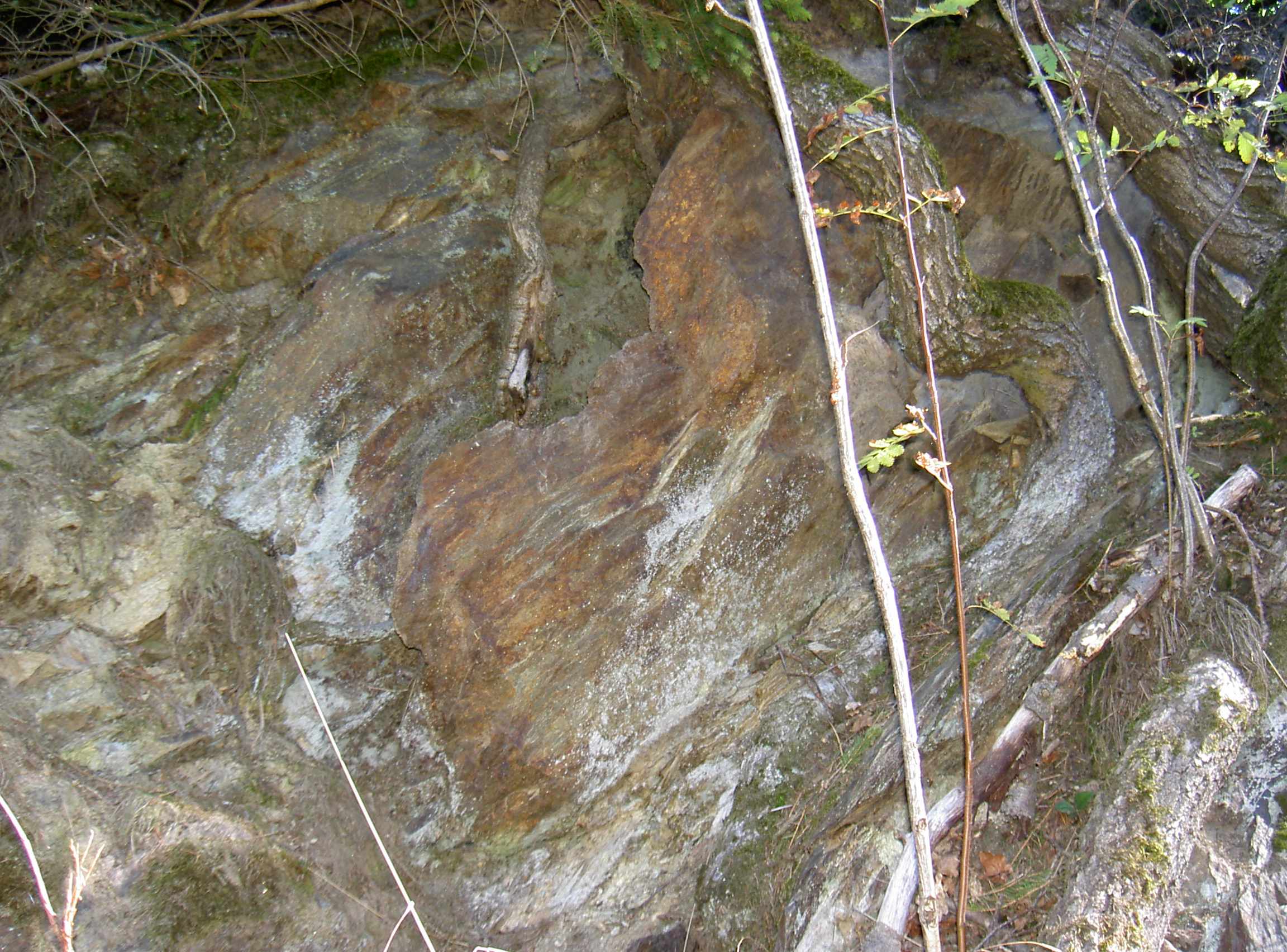 Gneisaufschluss (Steinmühle, Mitterteich)